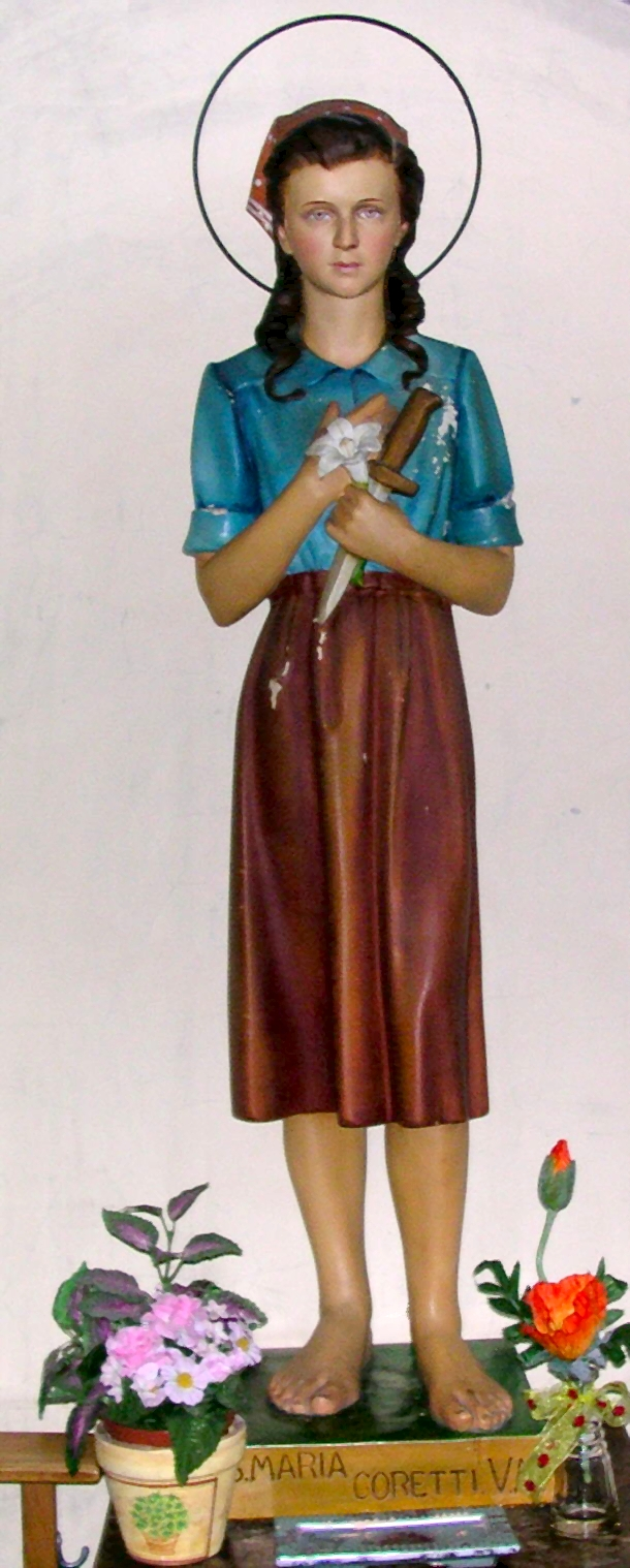 Statue der Heiligen Maria Goretti in der römisch-katholischen St.-Martins-Kirche von Visé (Belgien)